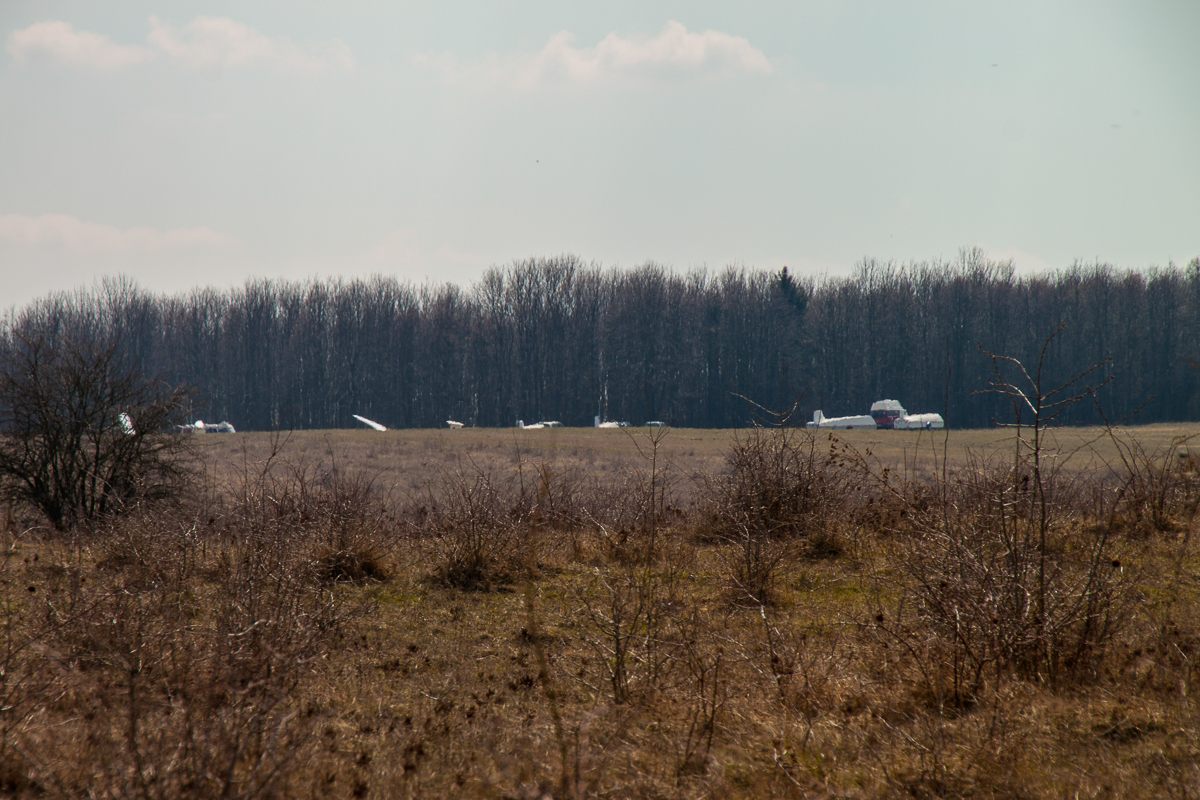 NSG Ebenberg – Auf dem Ebenberg in Landau – Blick zum Segelfluggelände